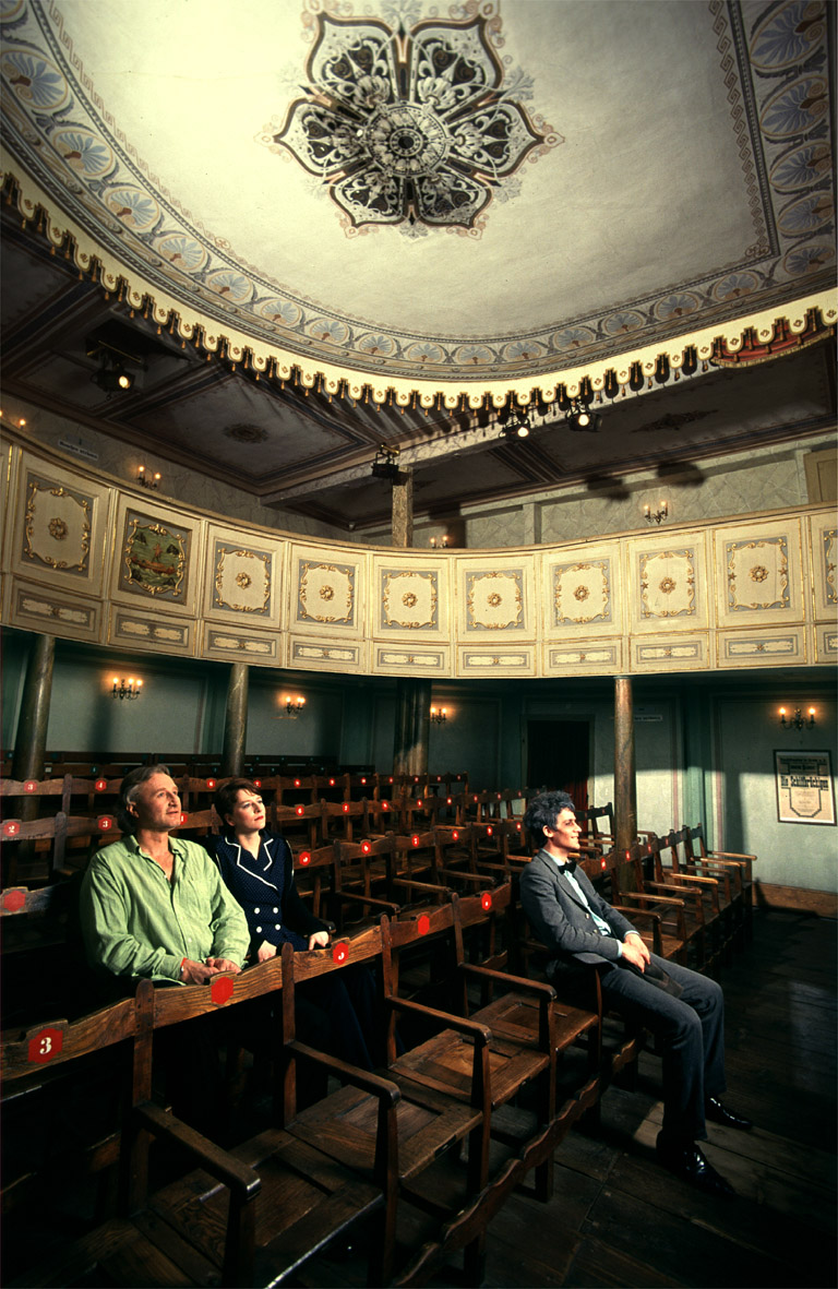 Theateransicht Sperrsitz Stadttheater Grein